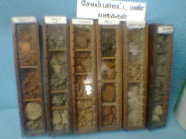 சேலம் மாவட்ட மண் வகைகள்